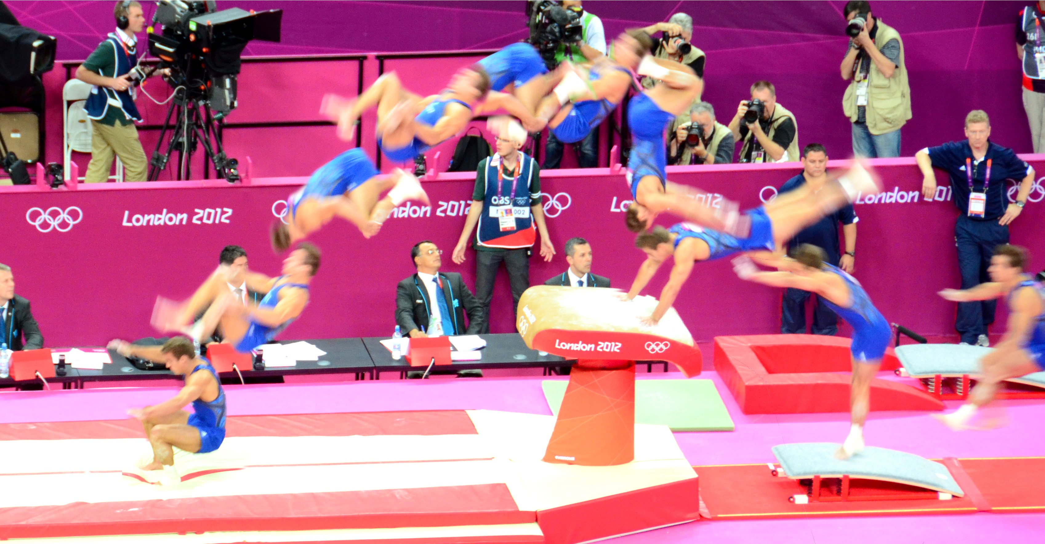 Lune double avant au saut, JO de Londres 2012.